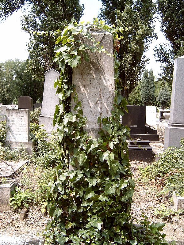 Jób Dániel (Arad, 1880. december 22. – Budapest, 1955. november 20.) író, rendező, színigazgató sírja Budapesten. Kozma utcai izraelita temető: 1C-6-27.